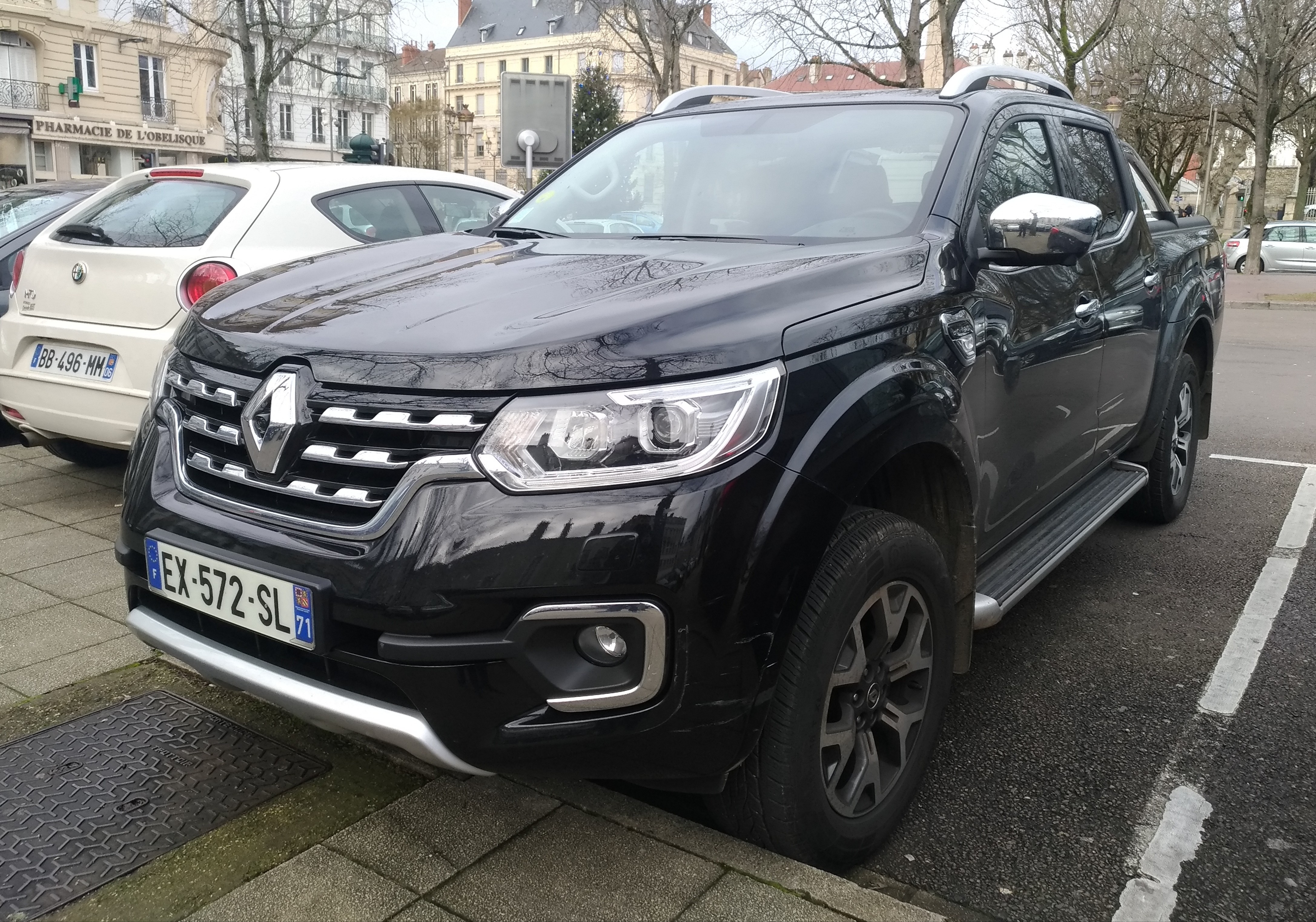 2018 Renault Alaskan (2.3 dCi 190 hp) at Chalon sur Saone